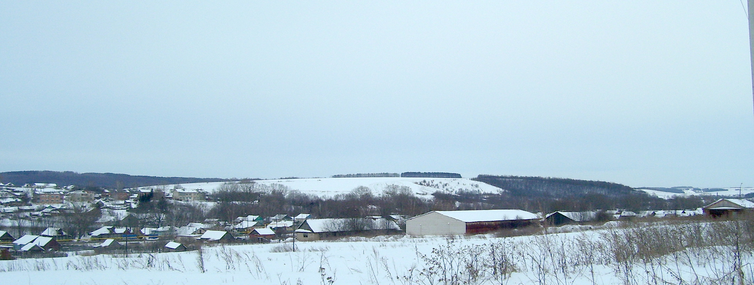 Село Рождествено.Вид с со стороны тока. 02.2009г. *